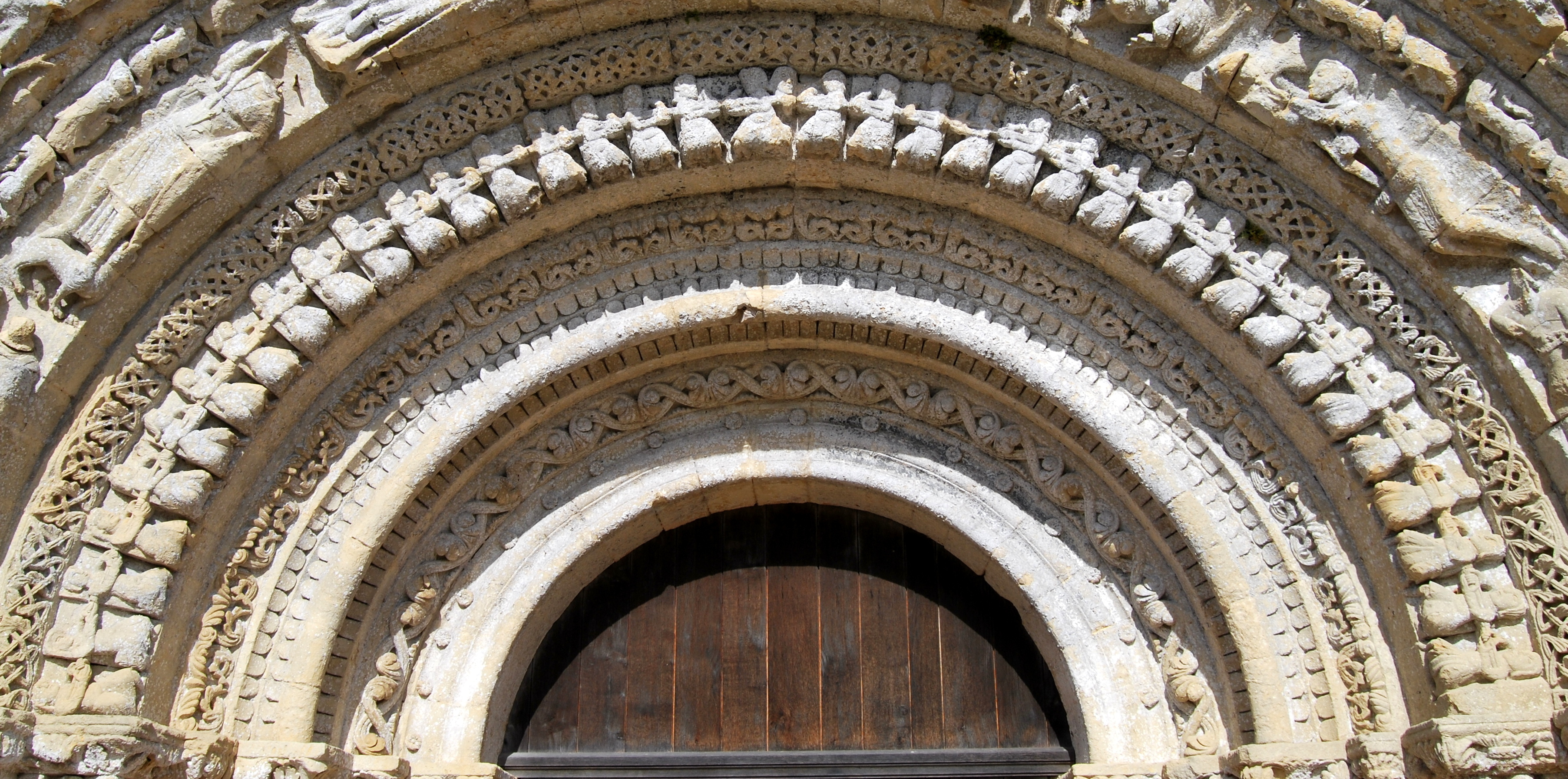 Castelviel église Notre-Dame Portail